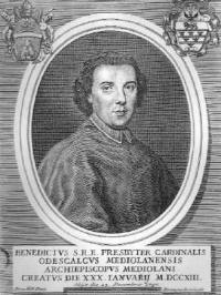 Ritratto del Cardinale Benedetto Erba Odescalchi (1679-1740), arcivescovo di Milano.